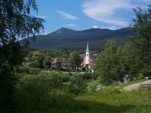 Blick über Lohberg auf den Kleinen Osser